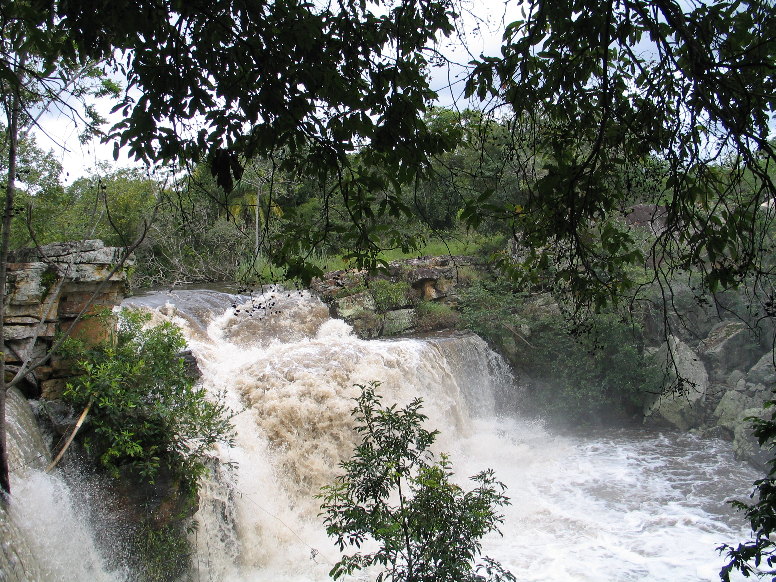 Uma cachoeira em alto nivél de água na Serra do Cpó, em um dia chuvoso